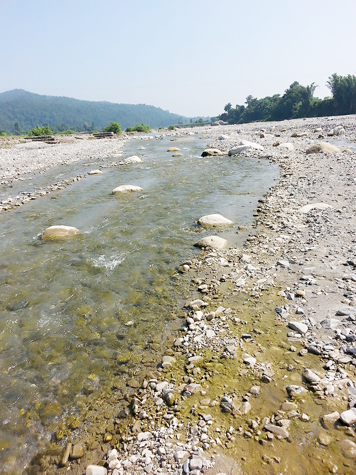 नेपाली: गाईघाट (उदयपुर) मा बरुआ नदी